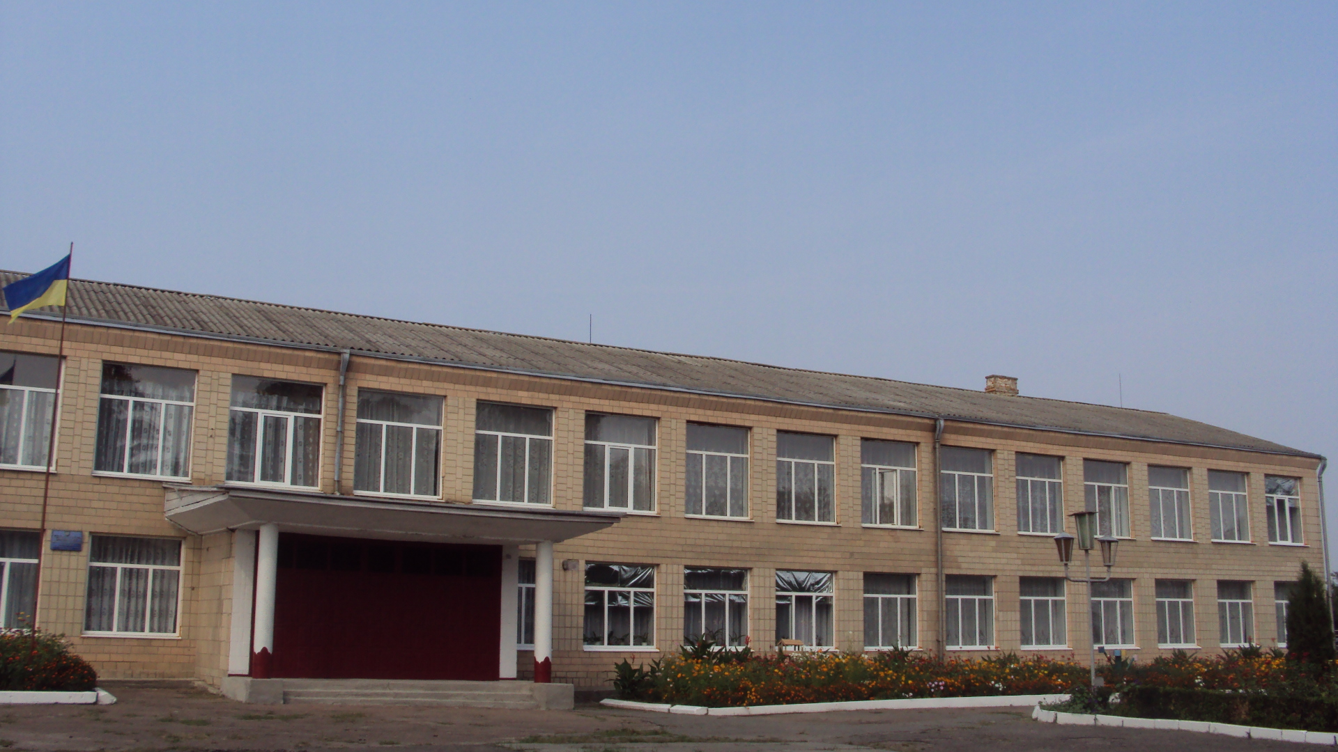 Shenderivskiy NVK. fasad